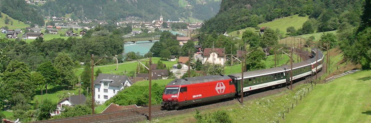 Eine SBB Re 460 mit IR bei Silenen unterwegs in Richtung Süden